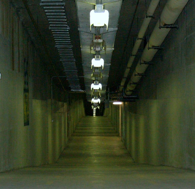 Tunnel de l'Université de Sherbrooke